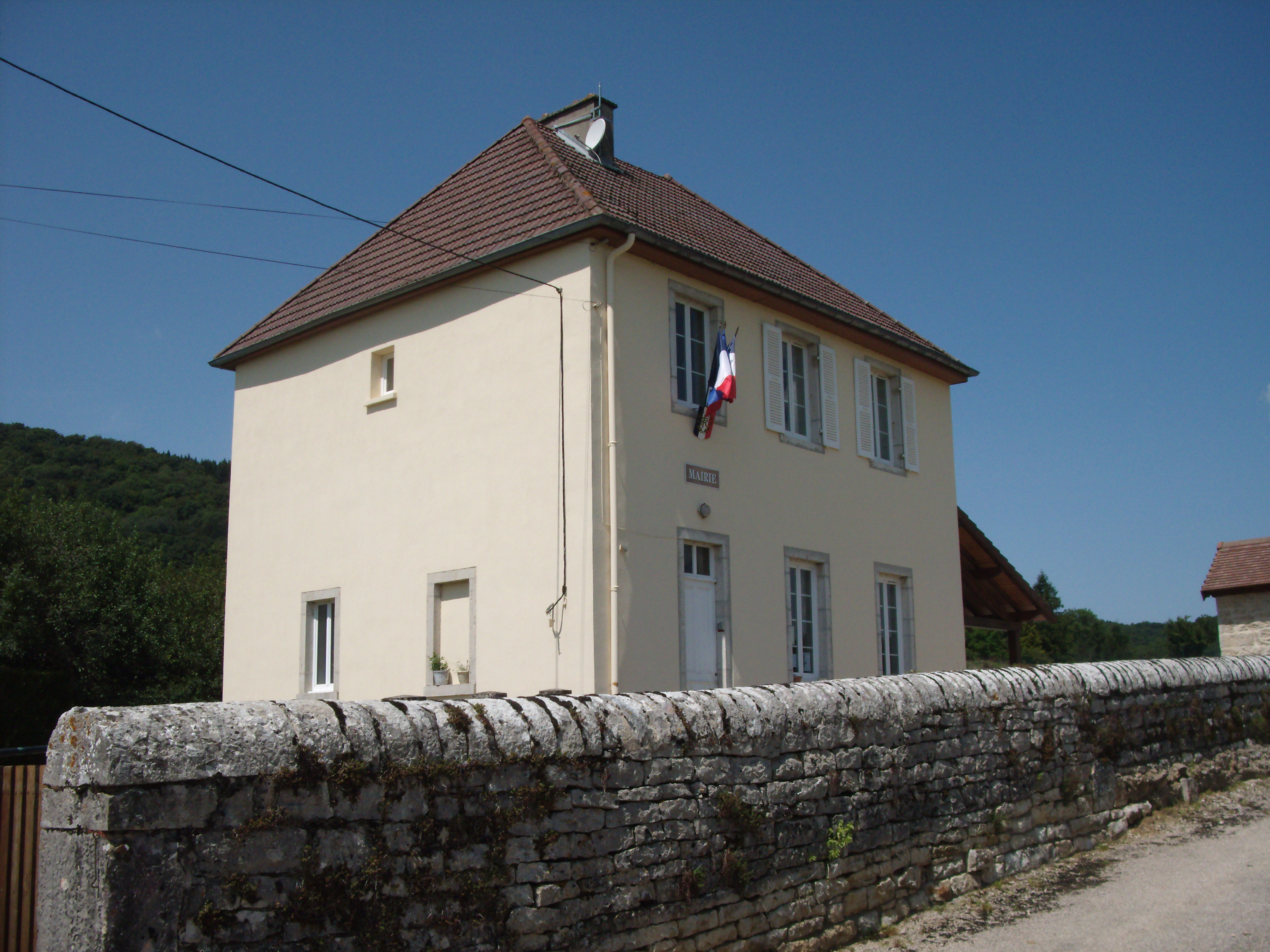 Broissia - Mairie